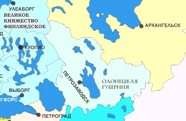 Олонецкая губерния на карте Российской империи в 1917 году (до октября)